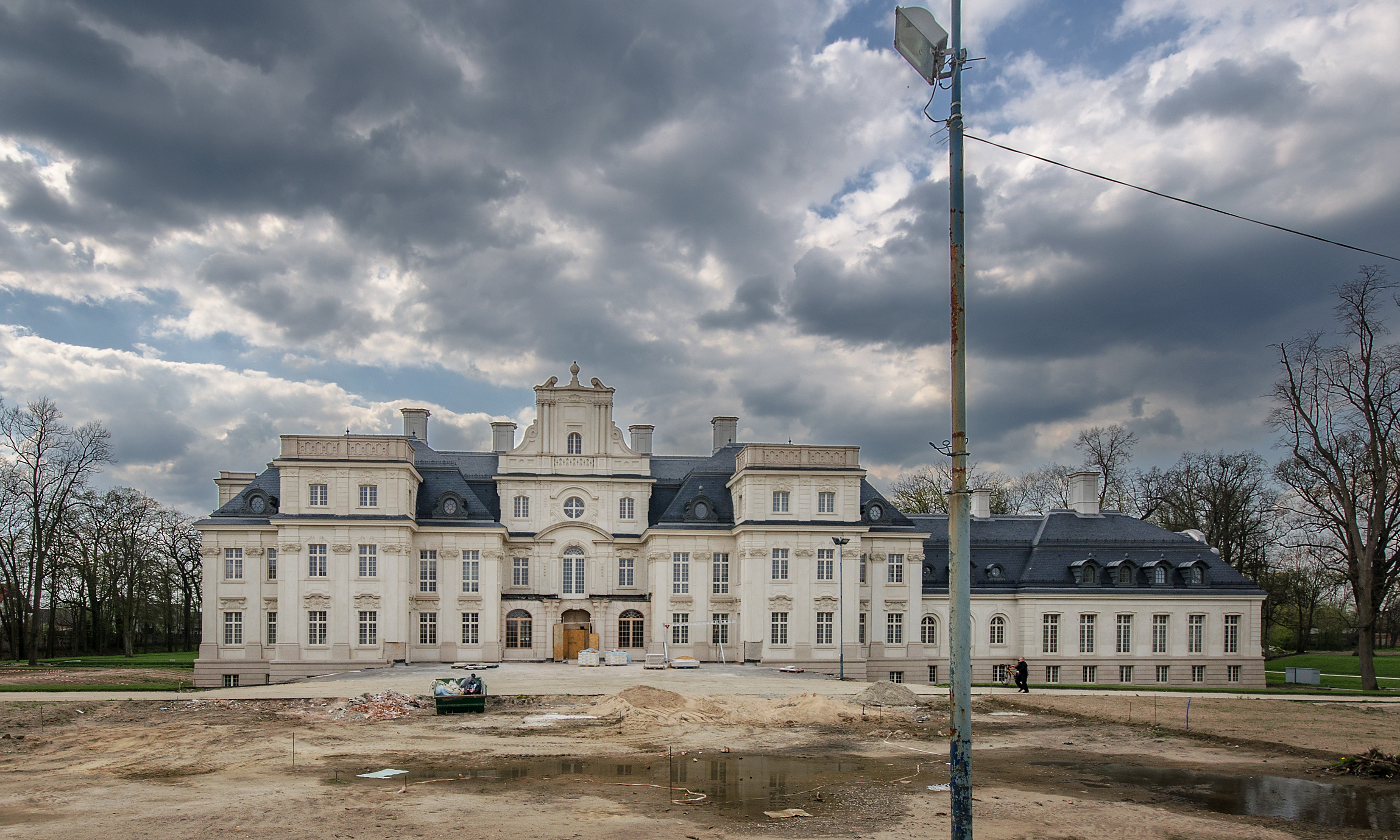 Chróstnik, pałac, 1723-1728, XIX